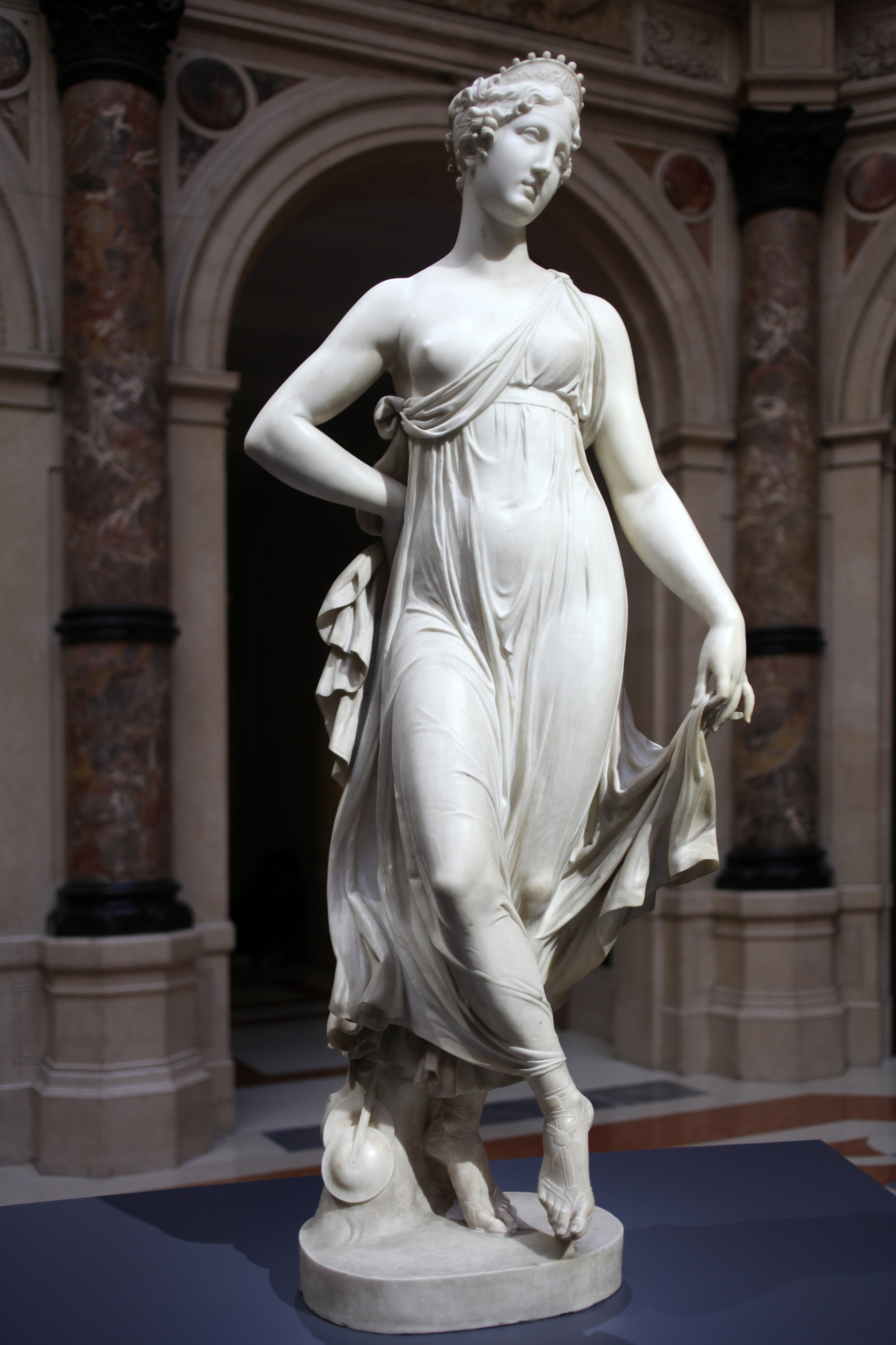 Gaetano Matteo Monti (1776-1847) Tersicore danzante (1820). Seminario Vescovile "Santa Maria della Pace", Cremona. Fotografata alla mostra "Canova-Thorwaldsen" presso le Galleria di Italia di Milano.